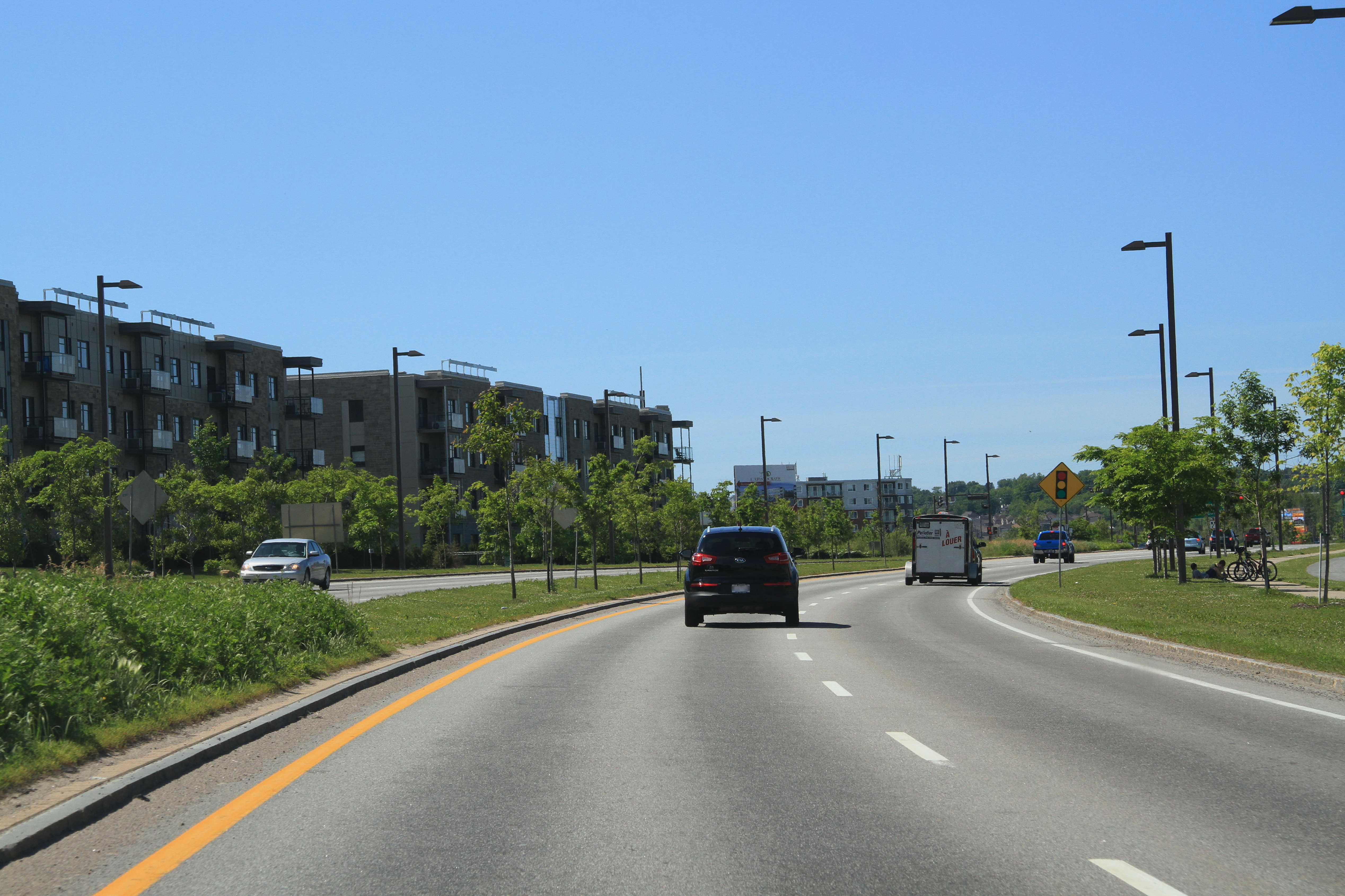 Le boulevard Robert-Bourassa (A740) en direction Nord, dans le secteur de l'avenue Chauveau dans l'arrondissement La Haute-Saint-Charles de la ville de Québec.